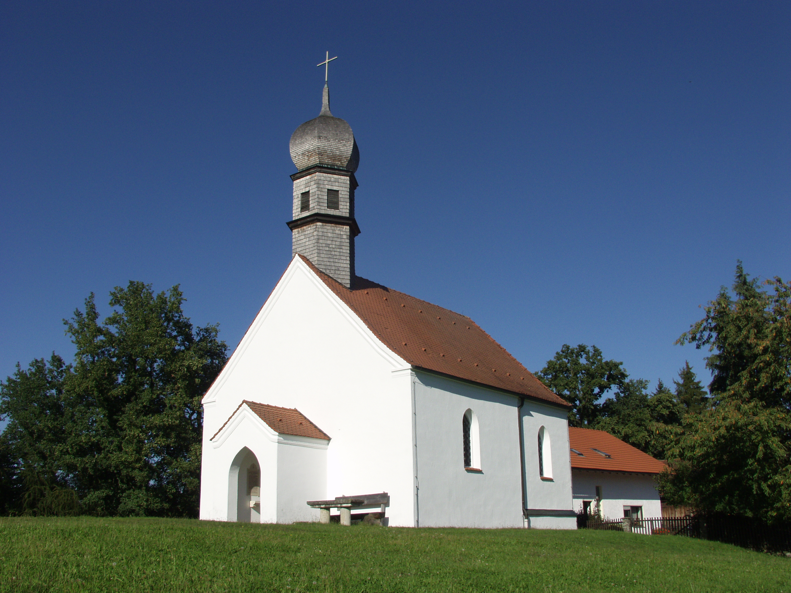 Kirche St. Stephanus auf dem Kapflberg in der Gemeinde Steinach, Kreis Straubing-Bogen 33″ N, 12° 37′ 45.48″ E